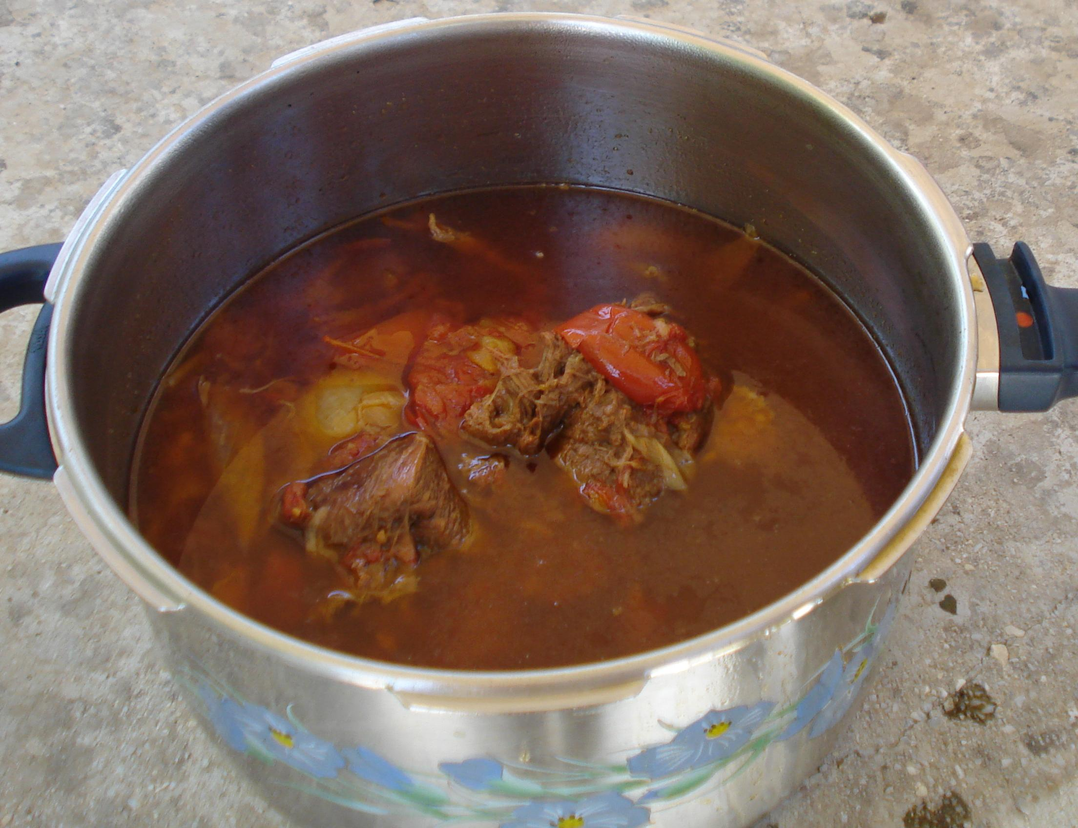 Preparació de l'stifado grec.